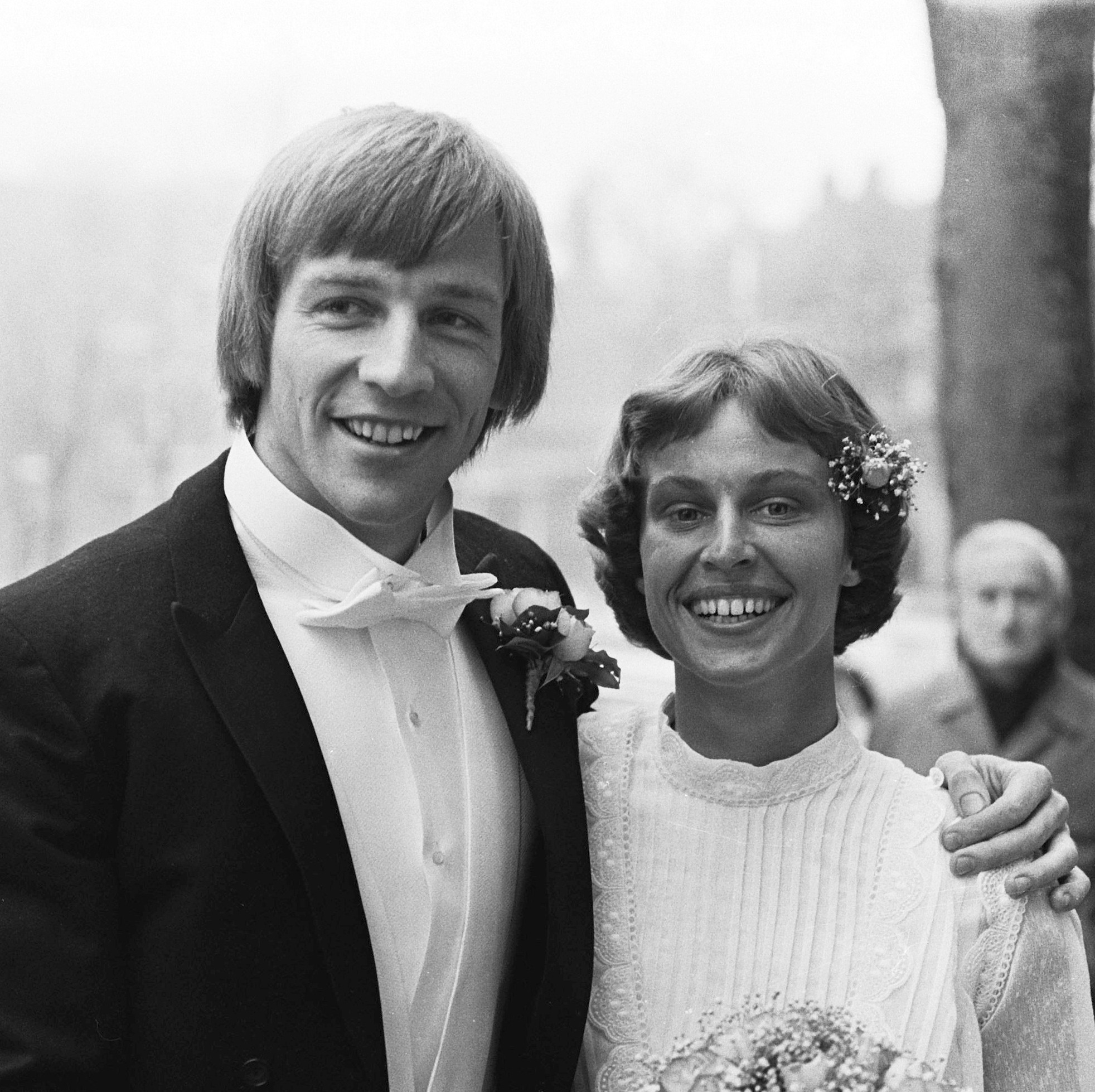 Huwelijk atleet Eltjo Schutter met Margot Zwolsman